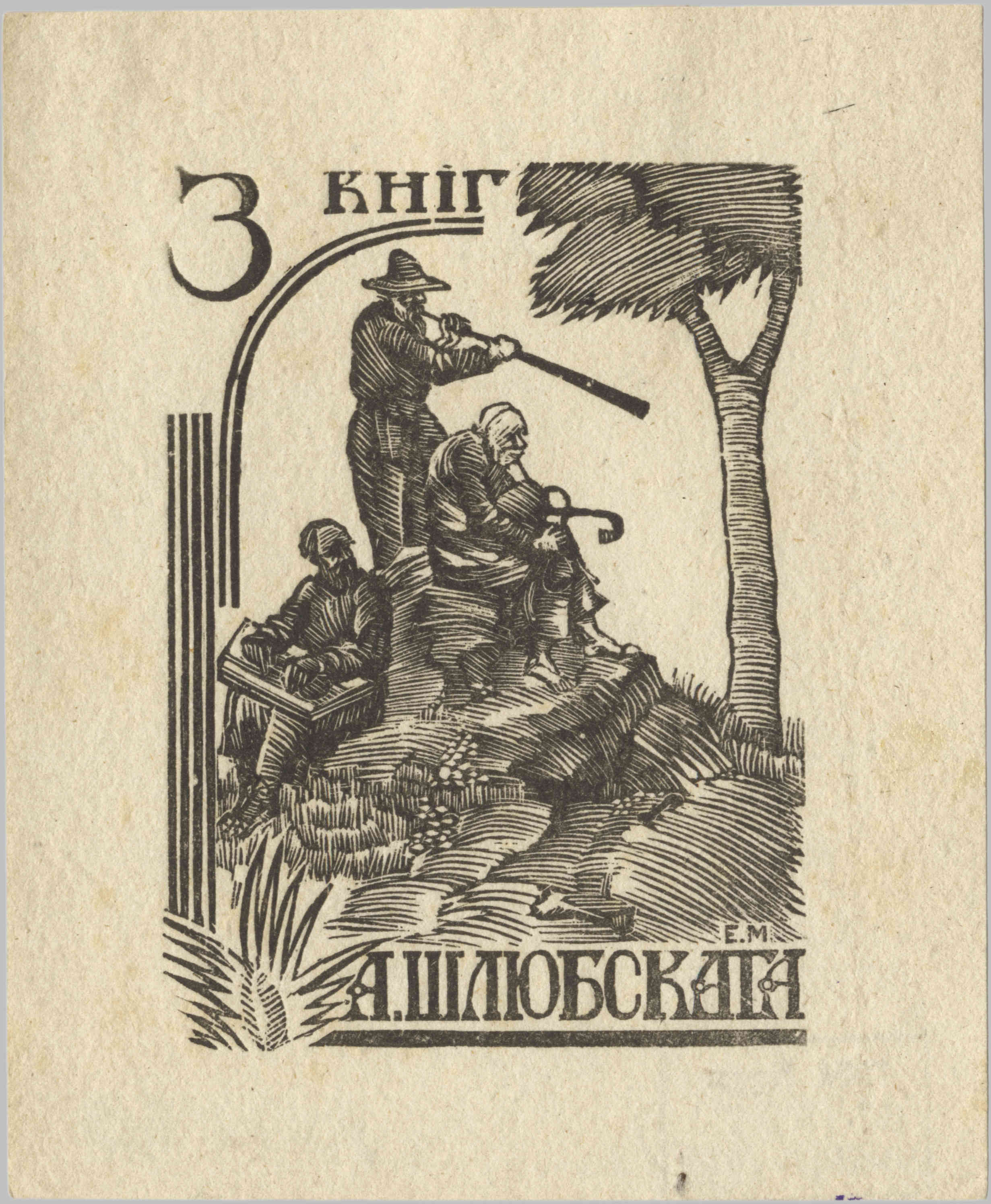 Экслібрыс Аляксандра Шлюбскага (1926) мастака Я. Мініна. Ксілагравюра. Чатырохкантовы. Аднакаляровы. Віцебск. Папера, ксілаграфія. А. 10,5×8,6 см; В. 7,8×5,6 см. Нацыянальны мастацкі музей Рэспублікі Беларусь